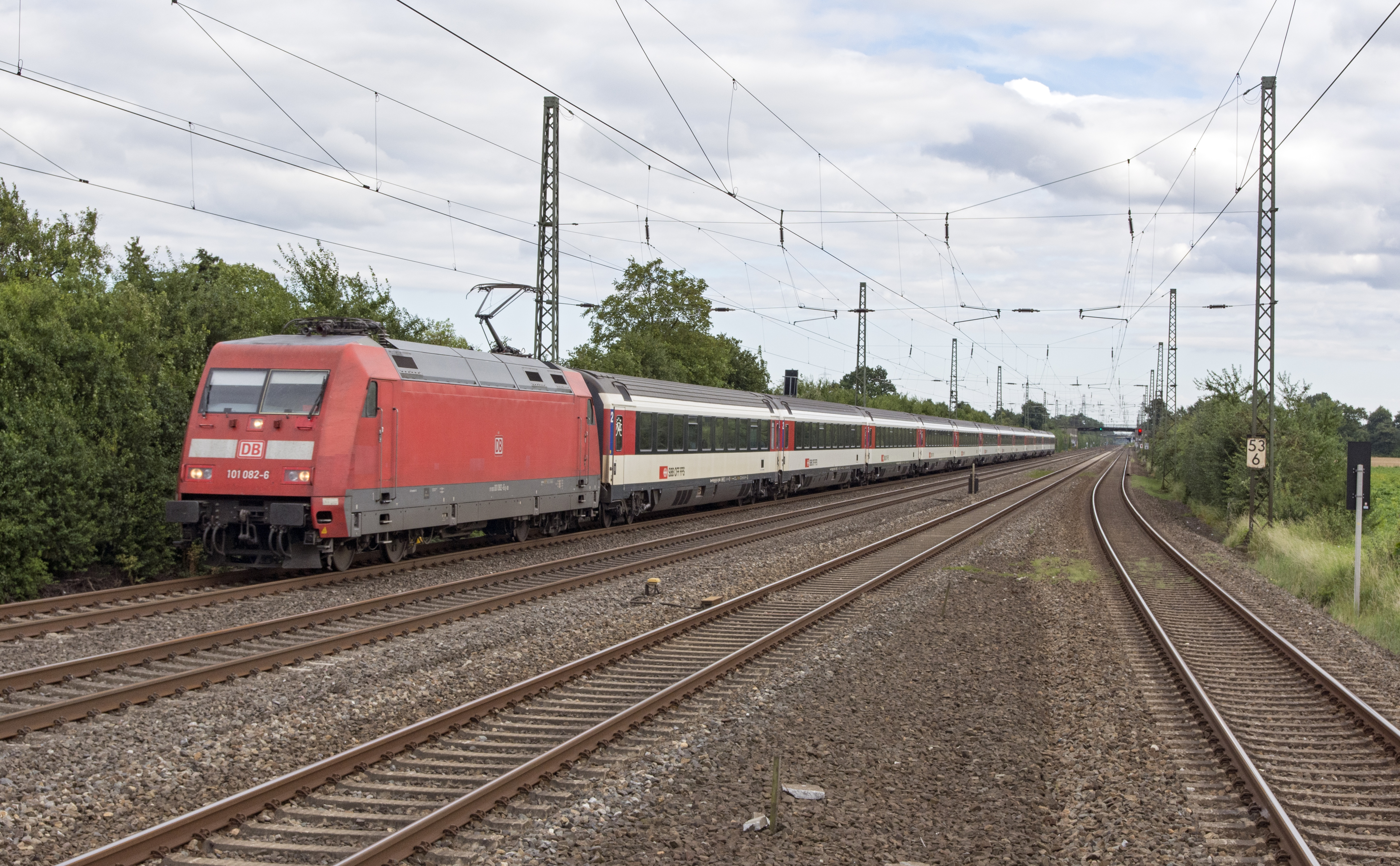 De afstandsvreter EC8 uit Zürich naar Hamburg Altona komt met ruim 30 minuten vertraging door Duisburg Rahm.